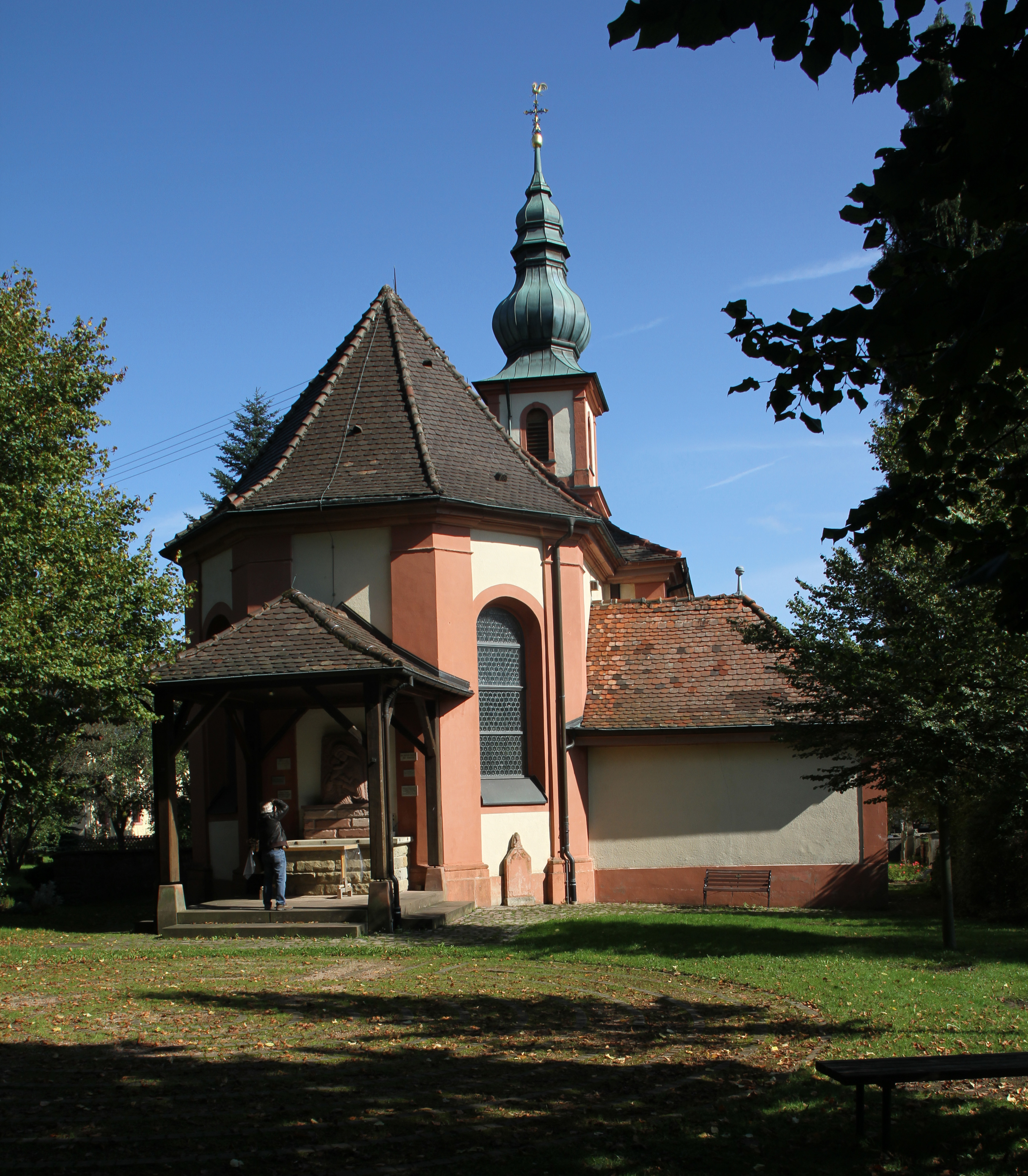 Die barocke Kirche "Maria Hilf" in Moosbronn (Ortsteil von Gaggenau) wurde 1749 geweiht.